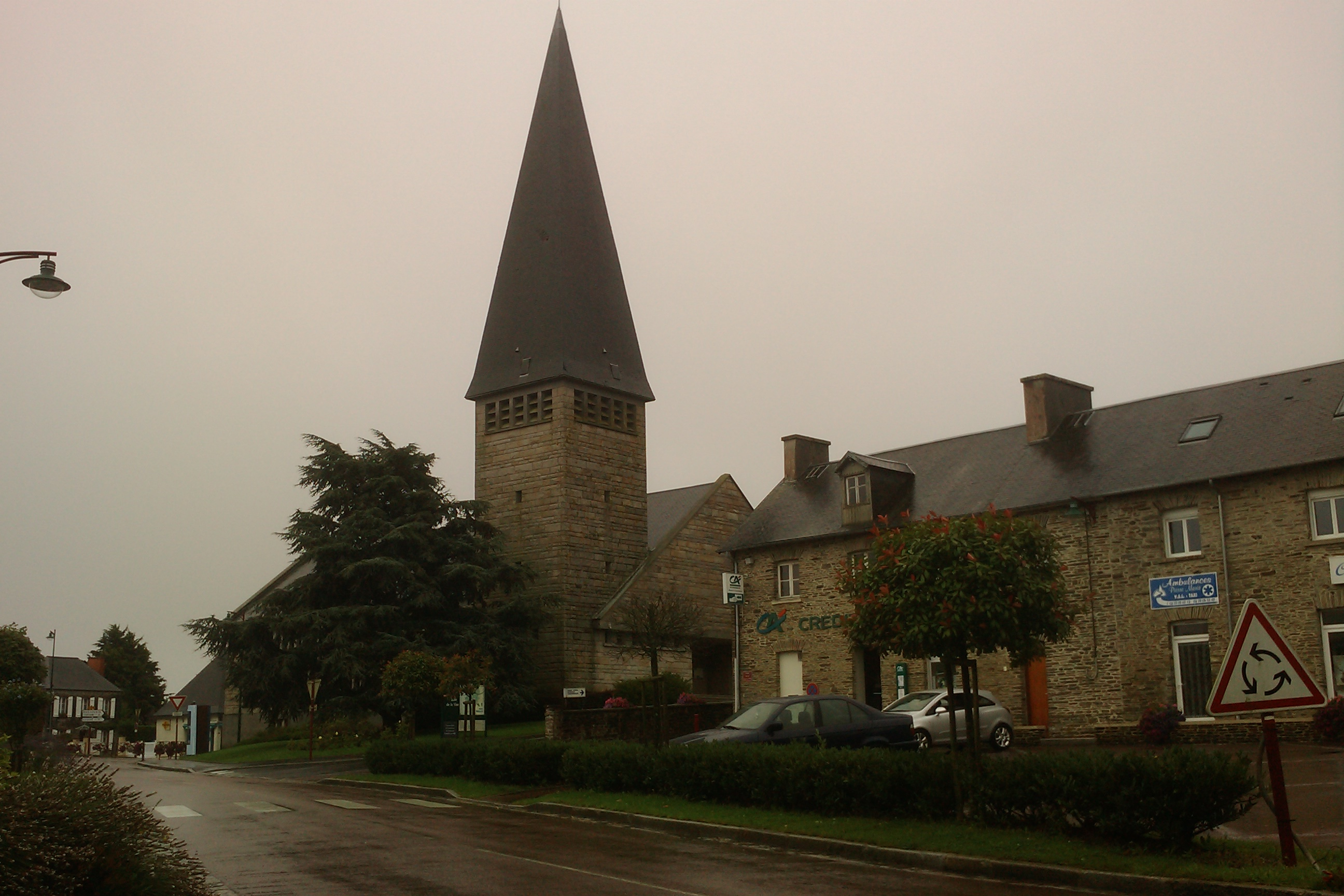 église de Saint-Jean-des-Baisants